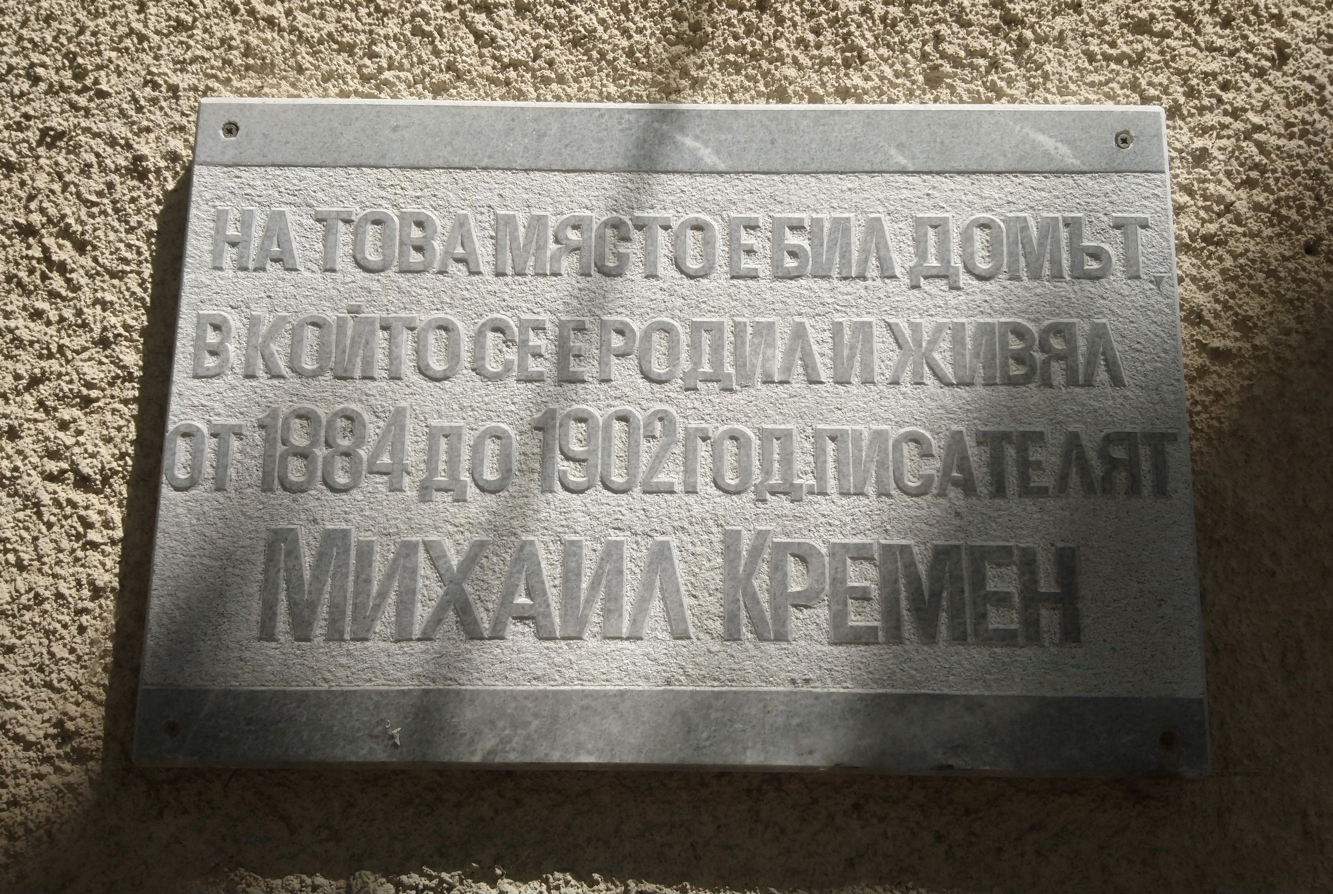 Паметна плоча на писателя Михаил Кремен в град Оряхово